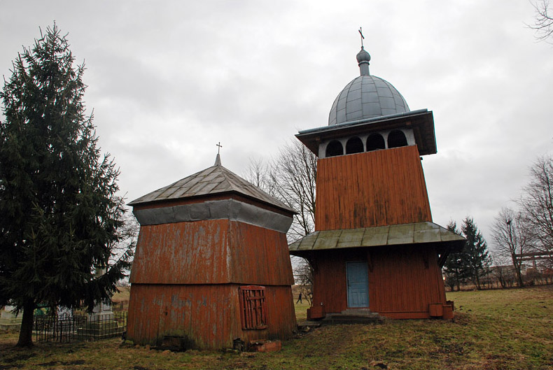 Церква Преображення Господнього: Церква Преображення Господнього у селі Грімне